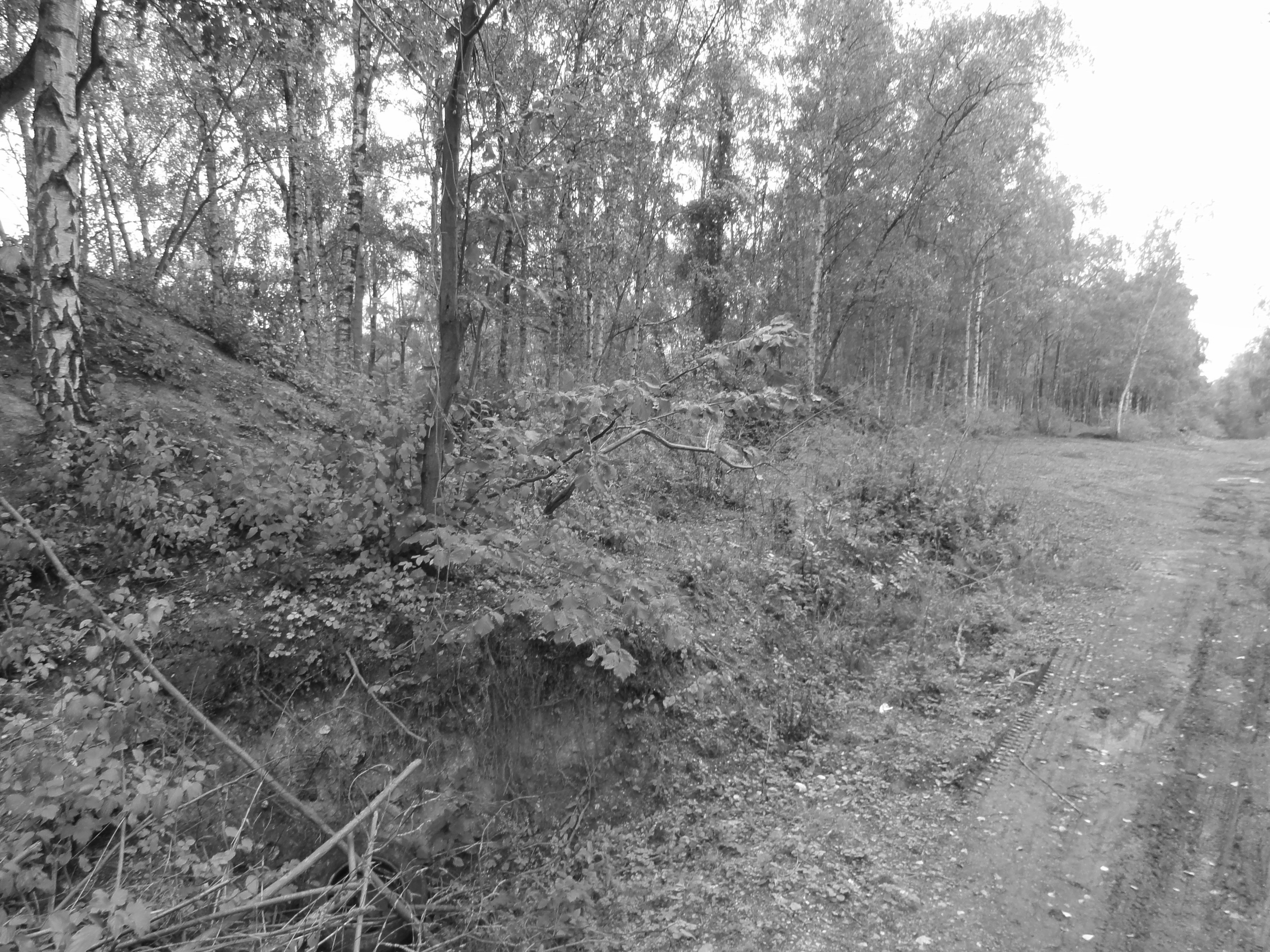 Terril n° 70A dit 3 - 4 de Meurchin Ouest chemin des îles, fosse n° 3 - 4 de la Compagnie des mines de Meurchin, Douvrin et Wingles, Pas-de-Calais, Nord-Pas-de-Calais, France.